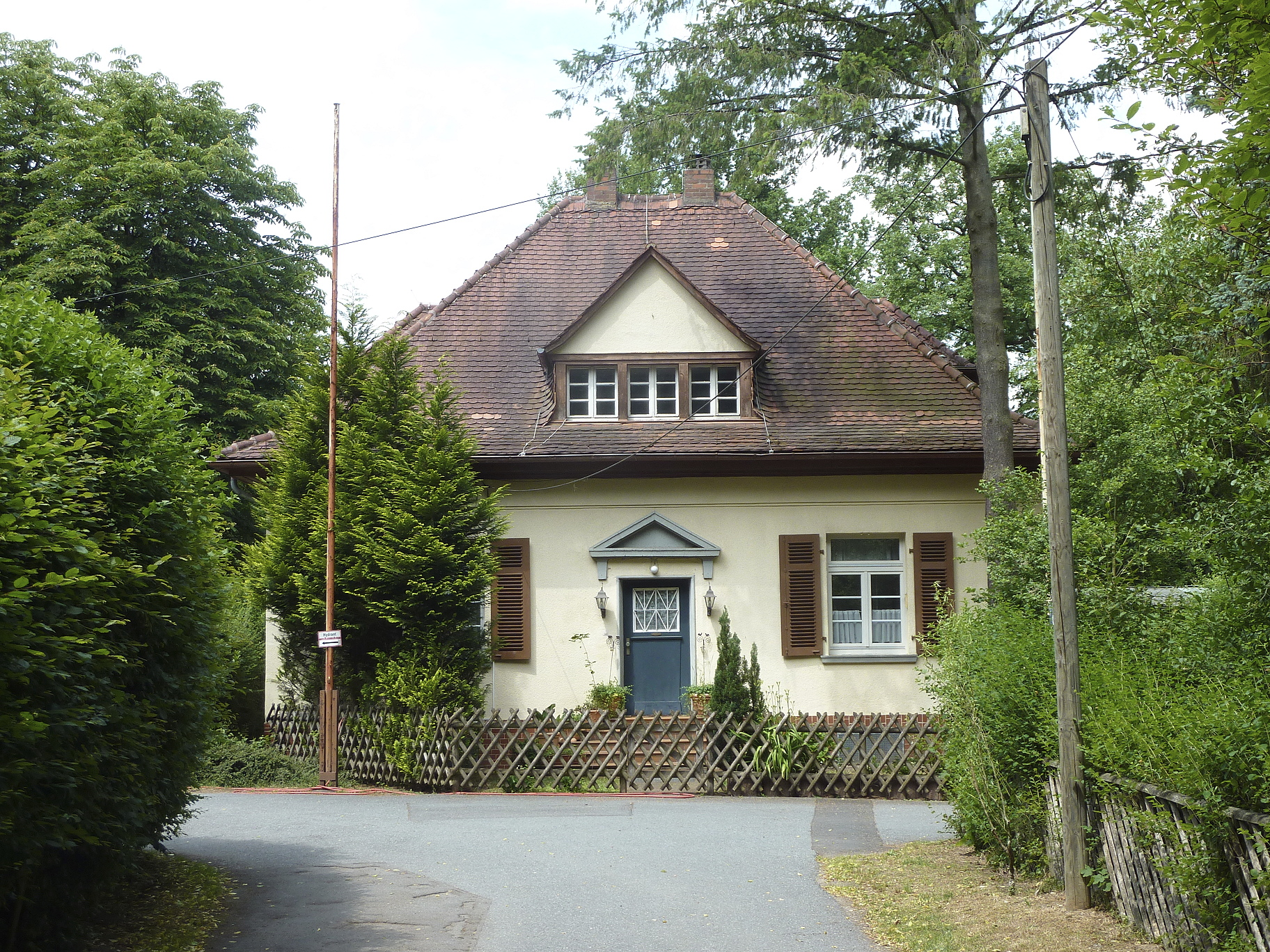 Frankfurt am Main, Frankfurter Stadtwald: Die GrünGürtel-Waldschule ist eine von mehreren Lernstationen im Frankfurter Grüngürtel für Schulklassen und Kindergruppen. Die Waldschule liegt in der Gemarkung des Stadtteils Sachsenhausen an der Oberschweinstiegschneise, etwa 300 Meter westlich des Jacobiweihers. Das Foto zeigt die vordere Fassade des Haupthauses, Ansicht von Südosten